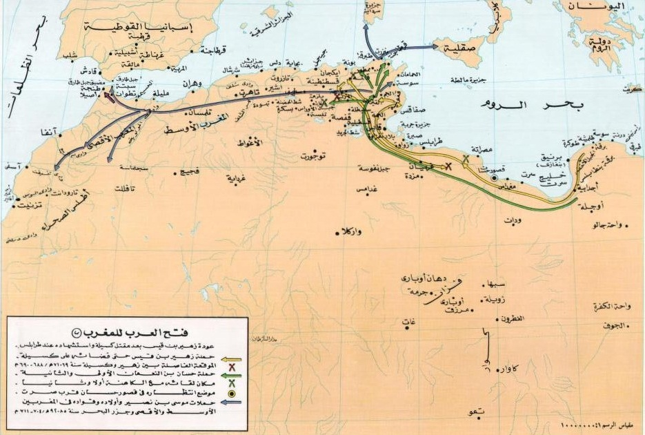 خارطة تُبيِّن مسار الحملة الإسلاميَّة ضد الكاهنة وفُتوحات مُوسى بن نُصير وأولاده في المغربين الأوسط والأقصى وجُزر البحر.